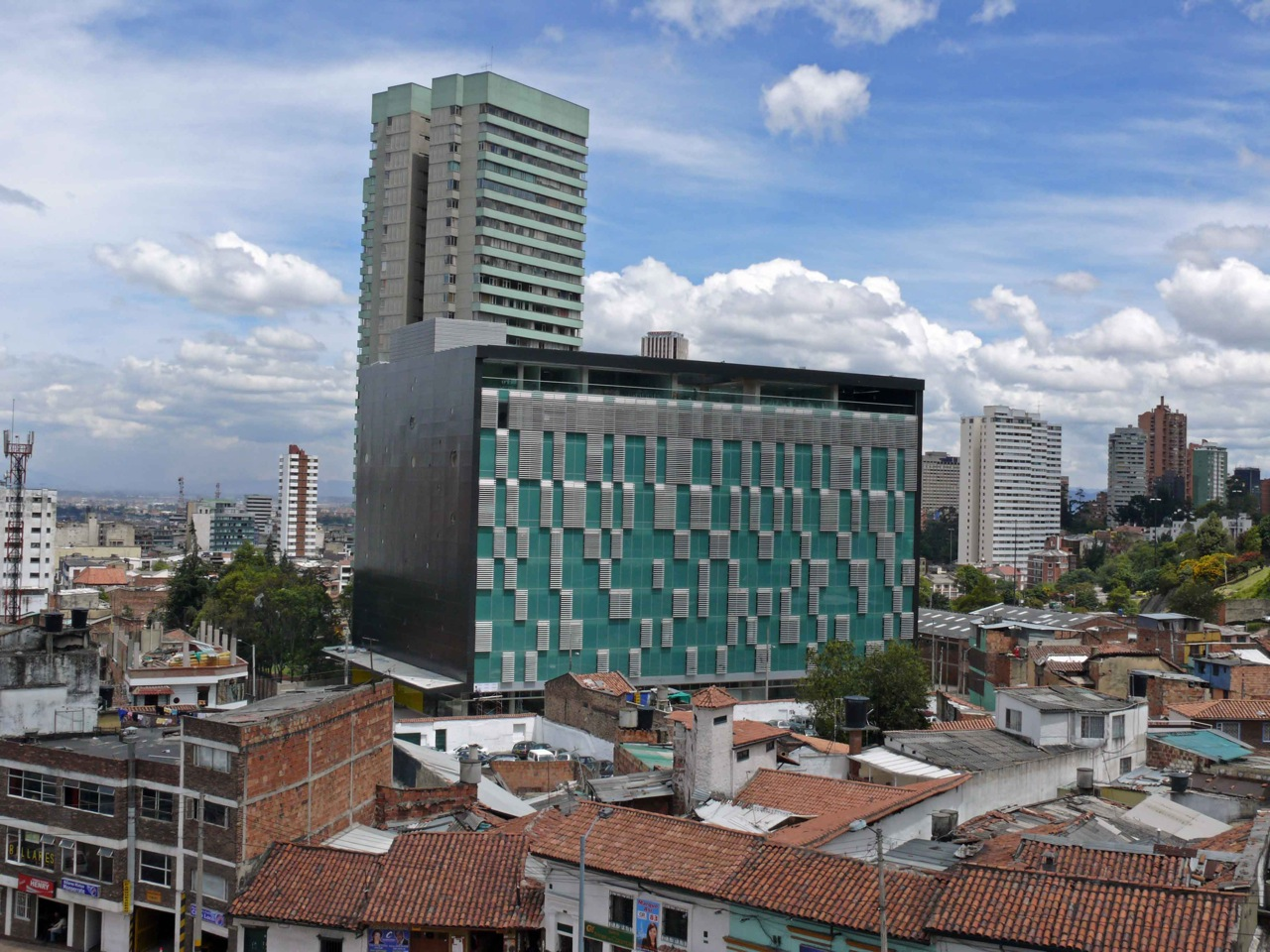 Edificio Julio Mario Santodomingo, Colombia